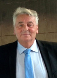 MF Edmund Joensen, fhv. lagmand (regeringschef) og lagtingsformand på Færøerne